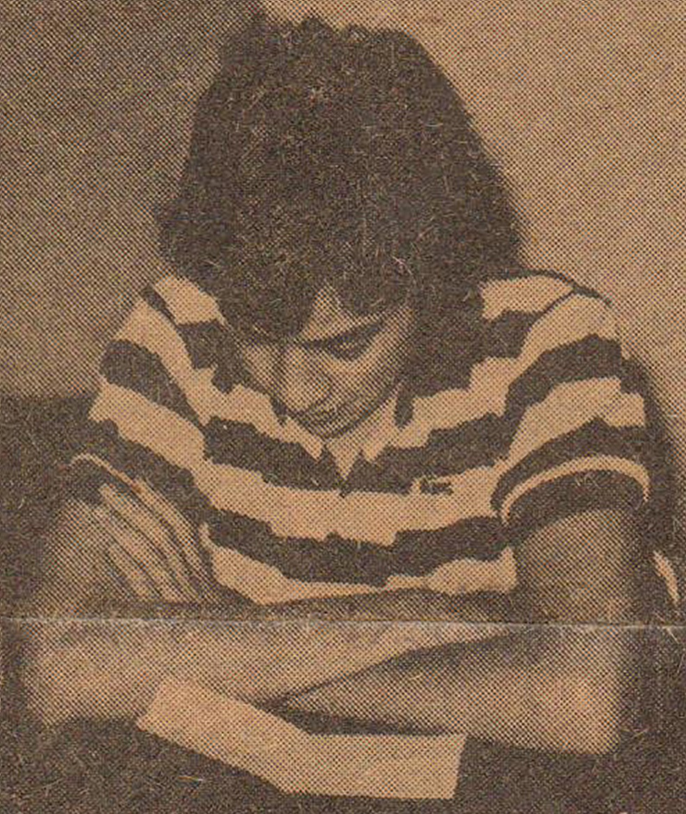 SGC, circa 1981. (Conferencia Revista "Ollin", organizada por la Universidad Autónoma de Aguascalientes.)